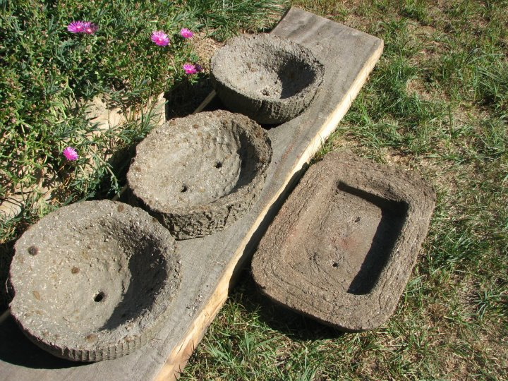 4 posude za biljke napravljene od Hypertufa smjese, pogodne za suculente i ostale biljke plitkog korjena.